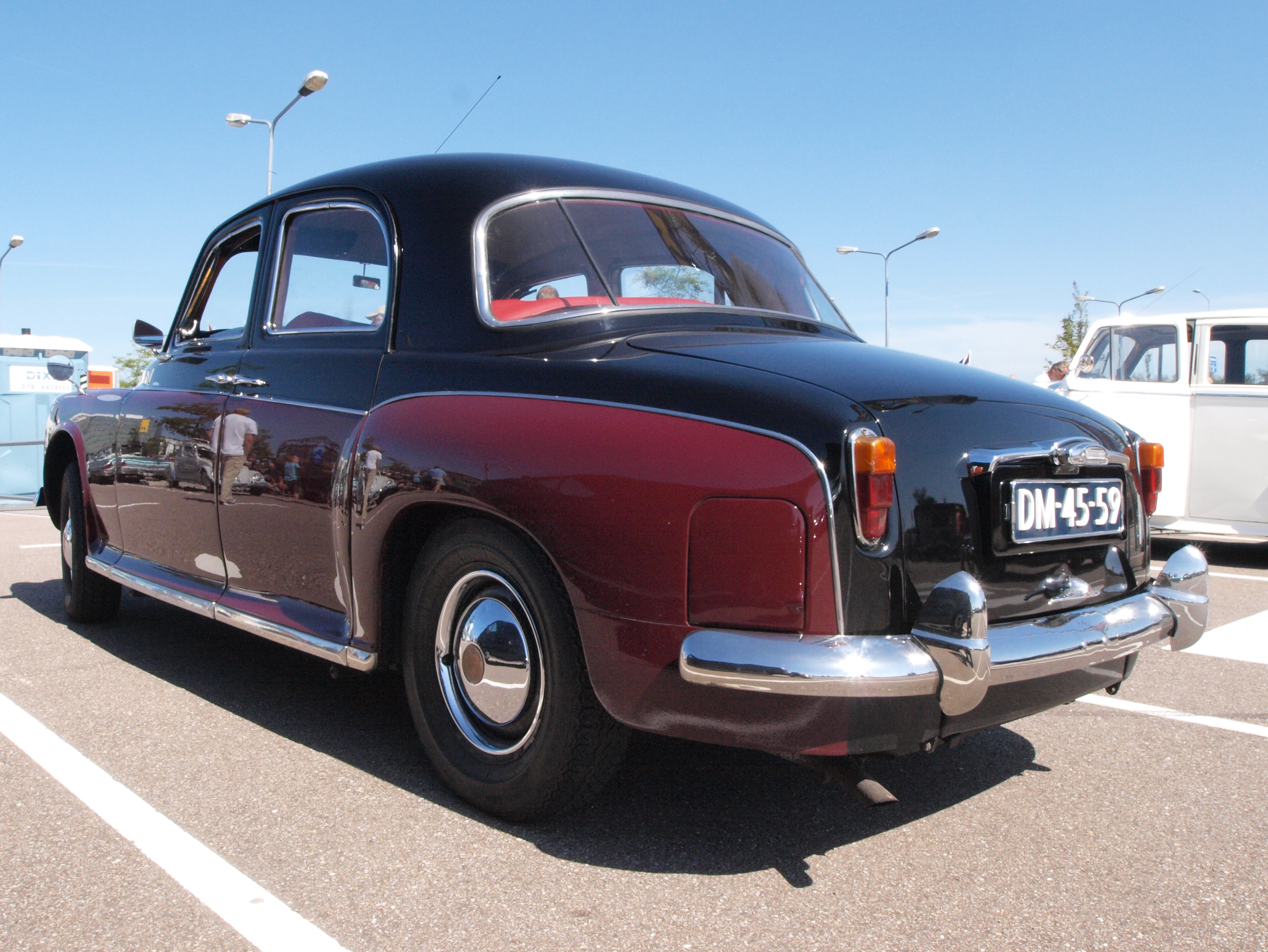 Rover P4 DM-45-59